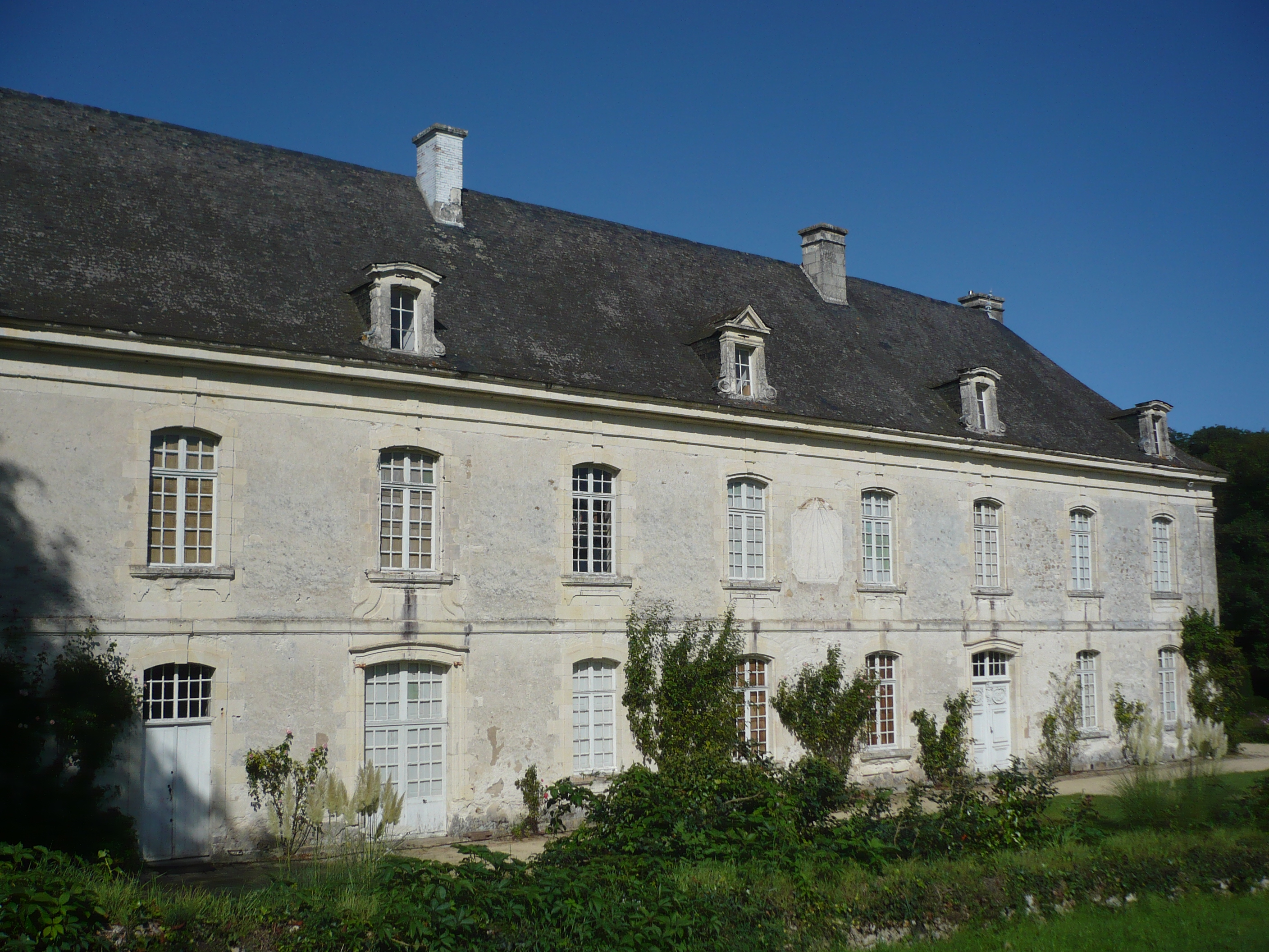 Dénezé sous Lude - Abbaye This building is en partie classé, en partie inscrit au titre des Monuments Historiques. .